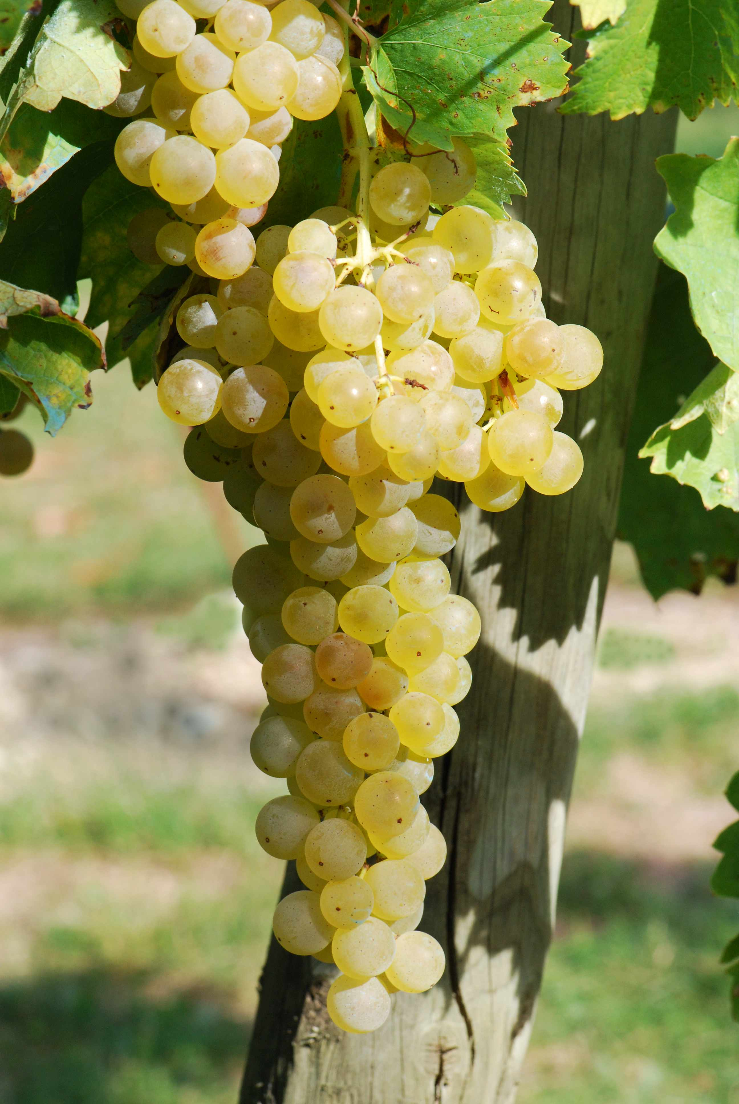 Ugni blanc, raisin, conservatoire du vignoble charentais, Cherves 17